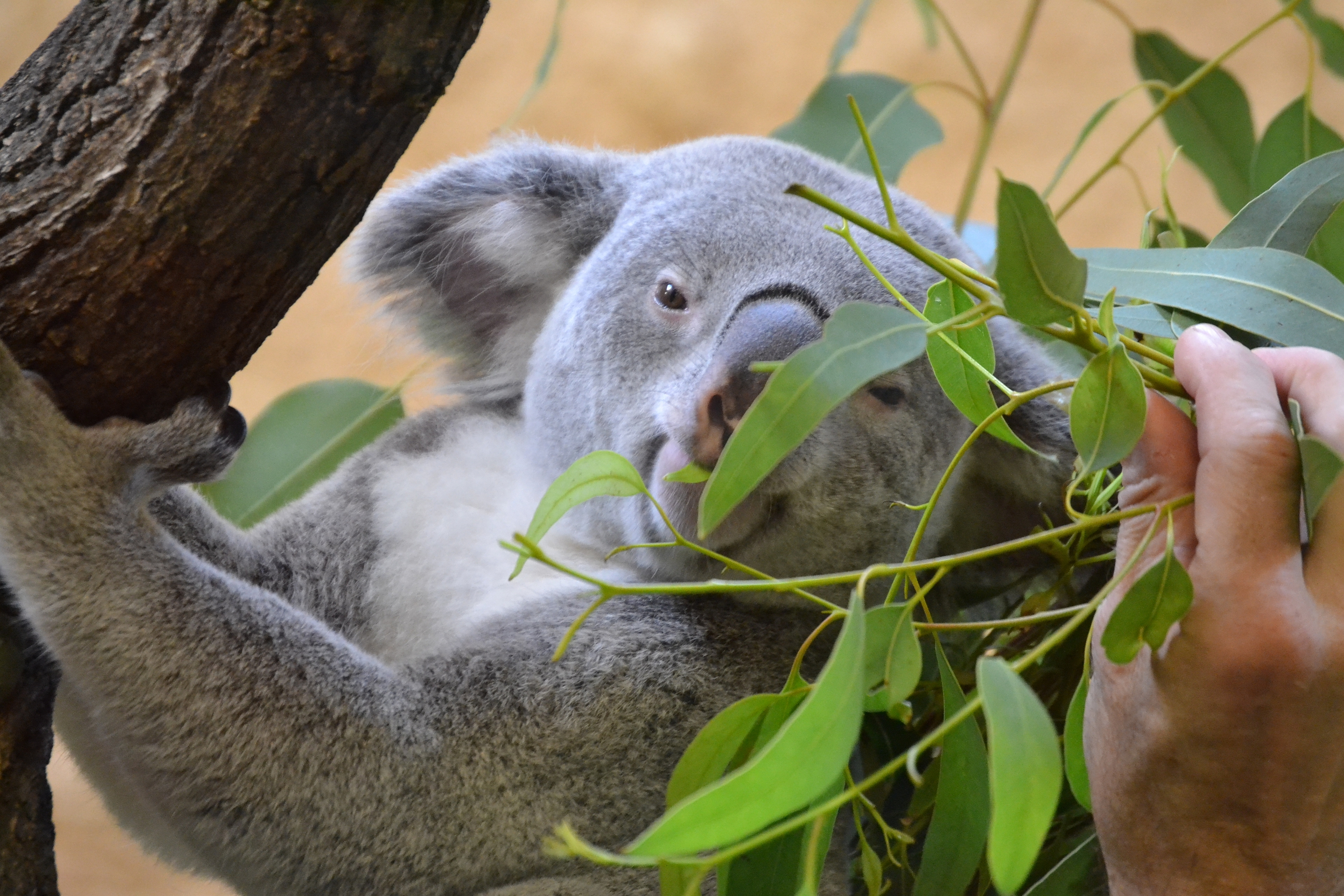 Koalamännchen im Dresdner Zoo bei der Futteraufnahme durch einen Tierpfleger.